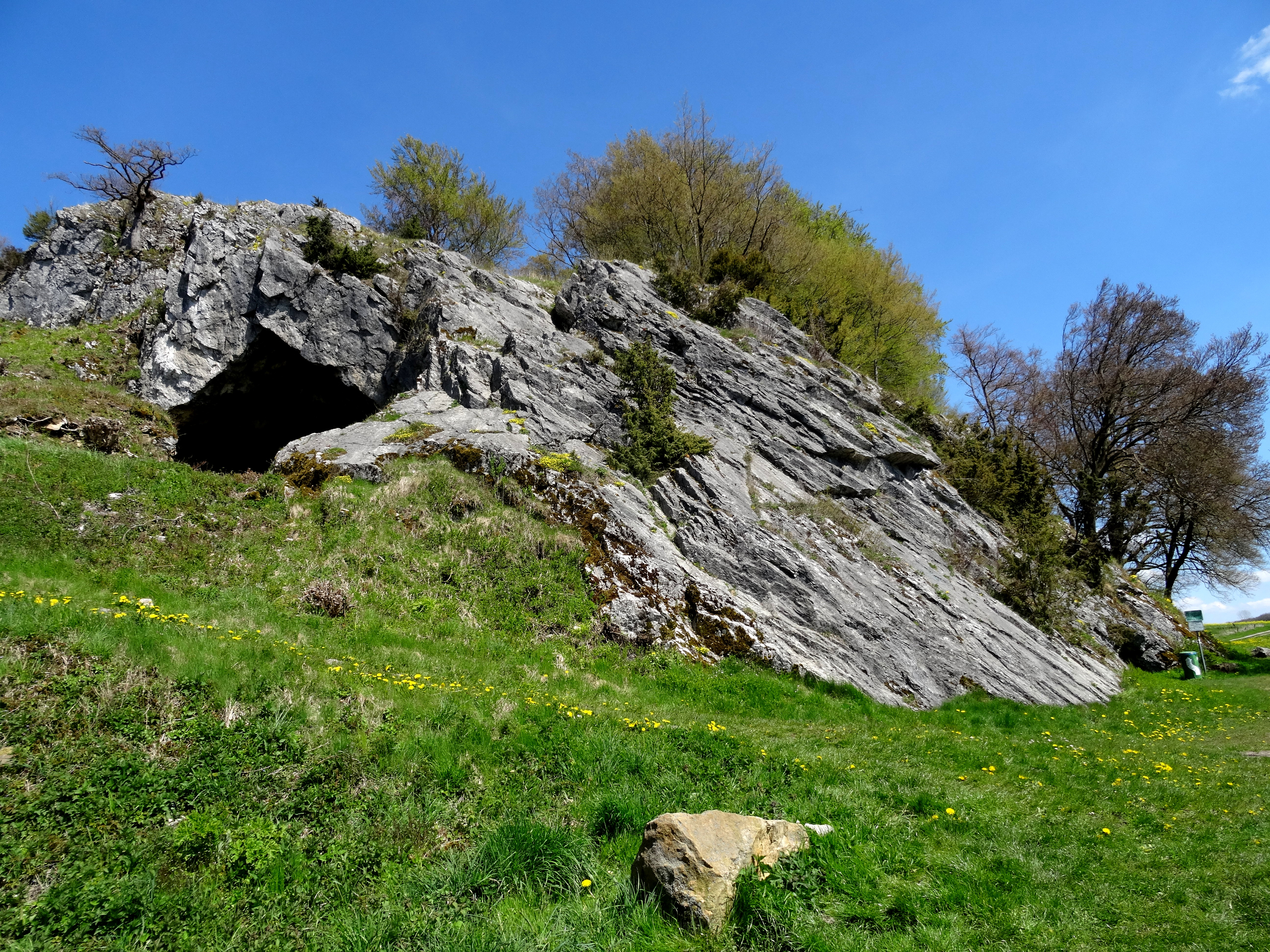 Naturschutzgebiet „Lörmecketal“ (NSG SO-073): Eingangsbereich ins Lörmecke-Tal in Rüthen, der Hohle Stein